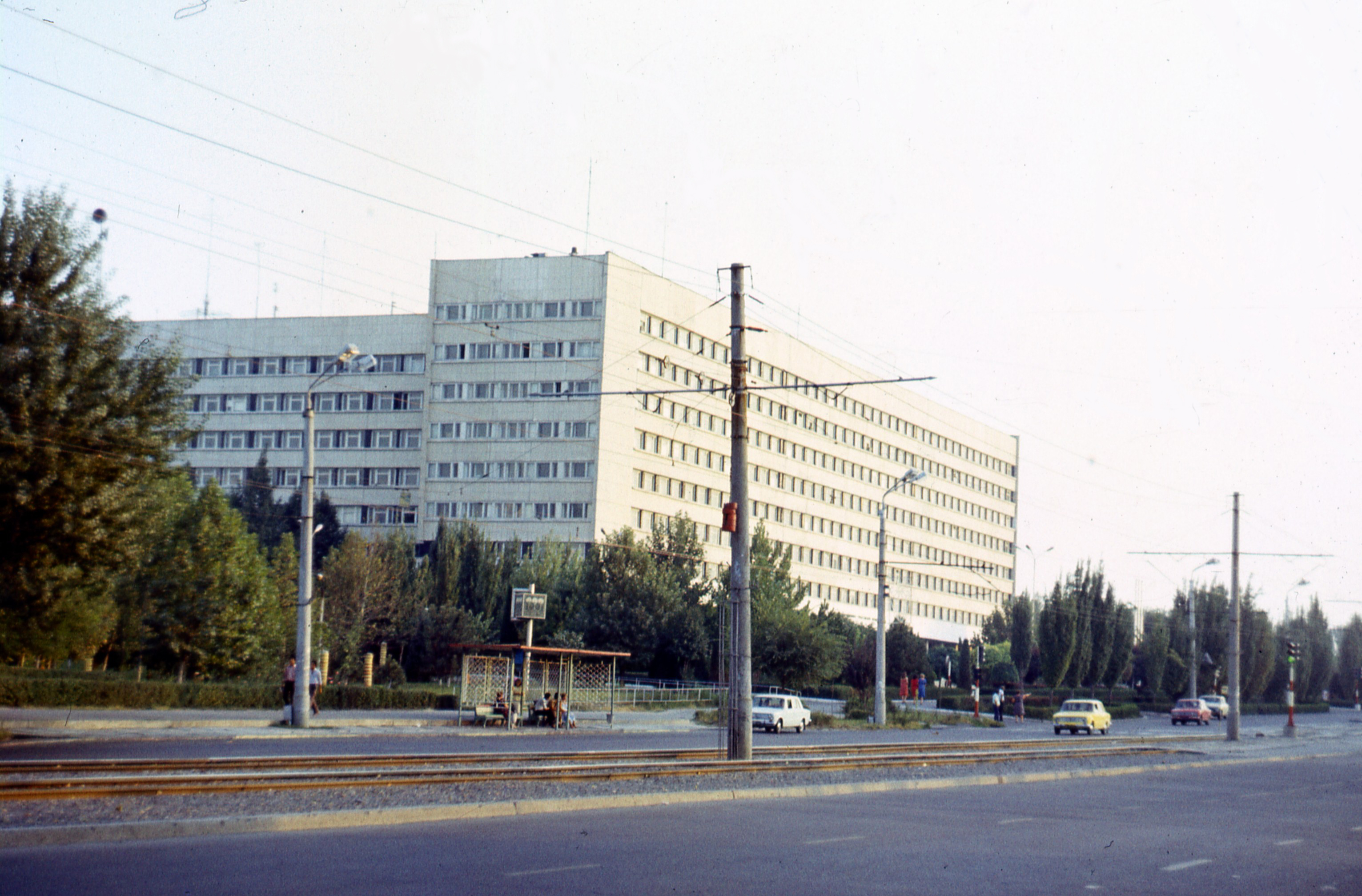 Здание штаба ТуркВО в Ташкенте, 1977 год; Расположение камеры: N41.334746 E69.334974